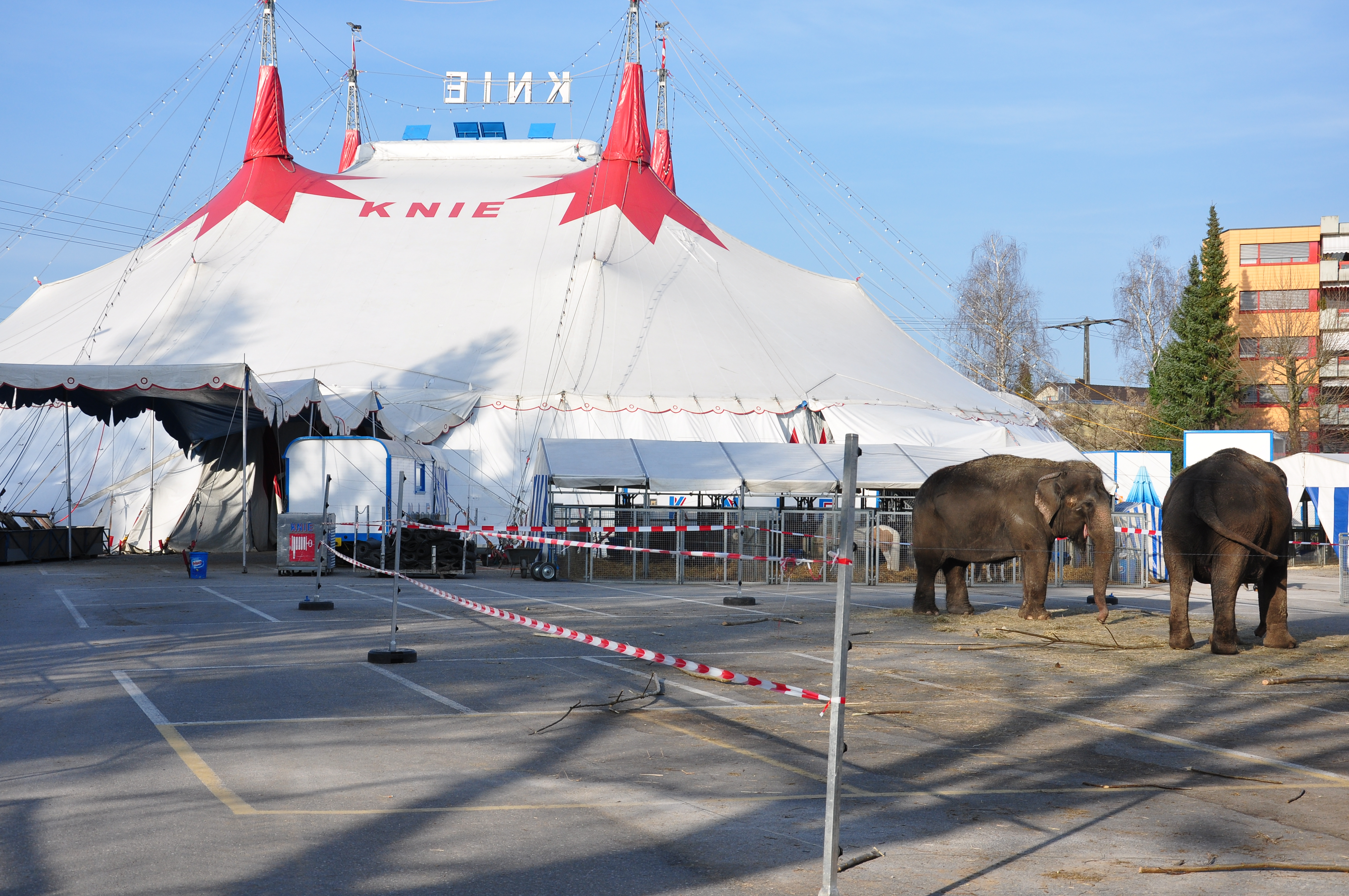 Circus Knie in Rapperswil (Switzerland)